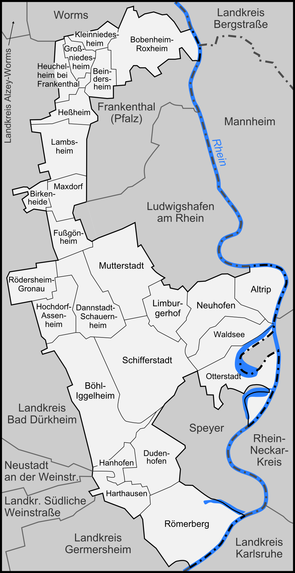 Karte der Gemeinden des Rhein-Pfalz-Kreises, sowie der umliegenden Landkreise und Kreisfreien Städte